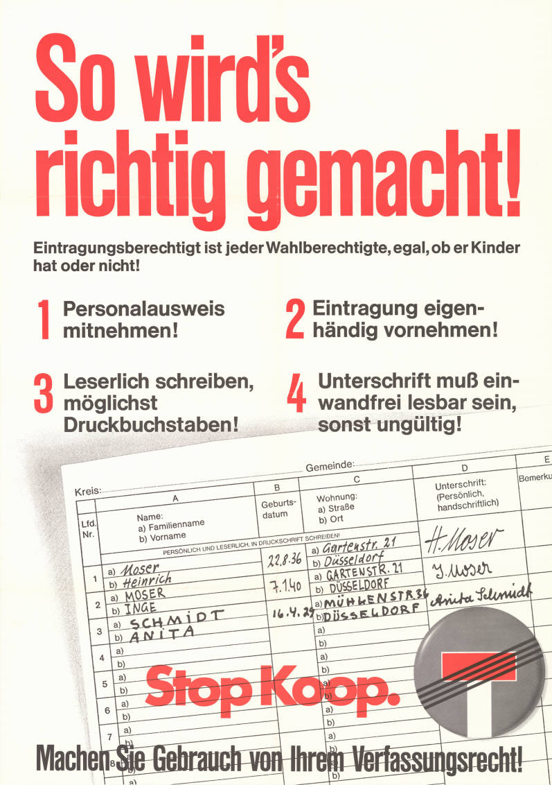 Plakat mit Aufforderung zur Einschreibung in Unterschriftenliste; Text: So wird's richtig gemacht! Plakatart: Motiv-/Textplakat Objekt-Signatur: 10-031 : 1012 Bestand: CDU-Plakate (10-031) GliederungBestand10-18: Textplakate Lizenz: KAS/ACDP 10-031 : 1012 CC-BY-SA 3.0 DE